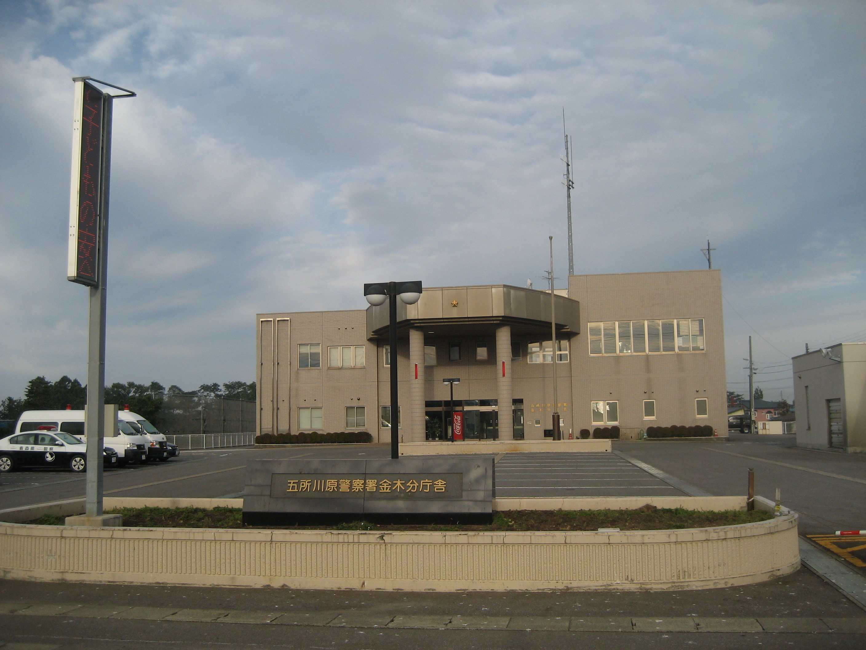 五所川原警察署金木分庁舎